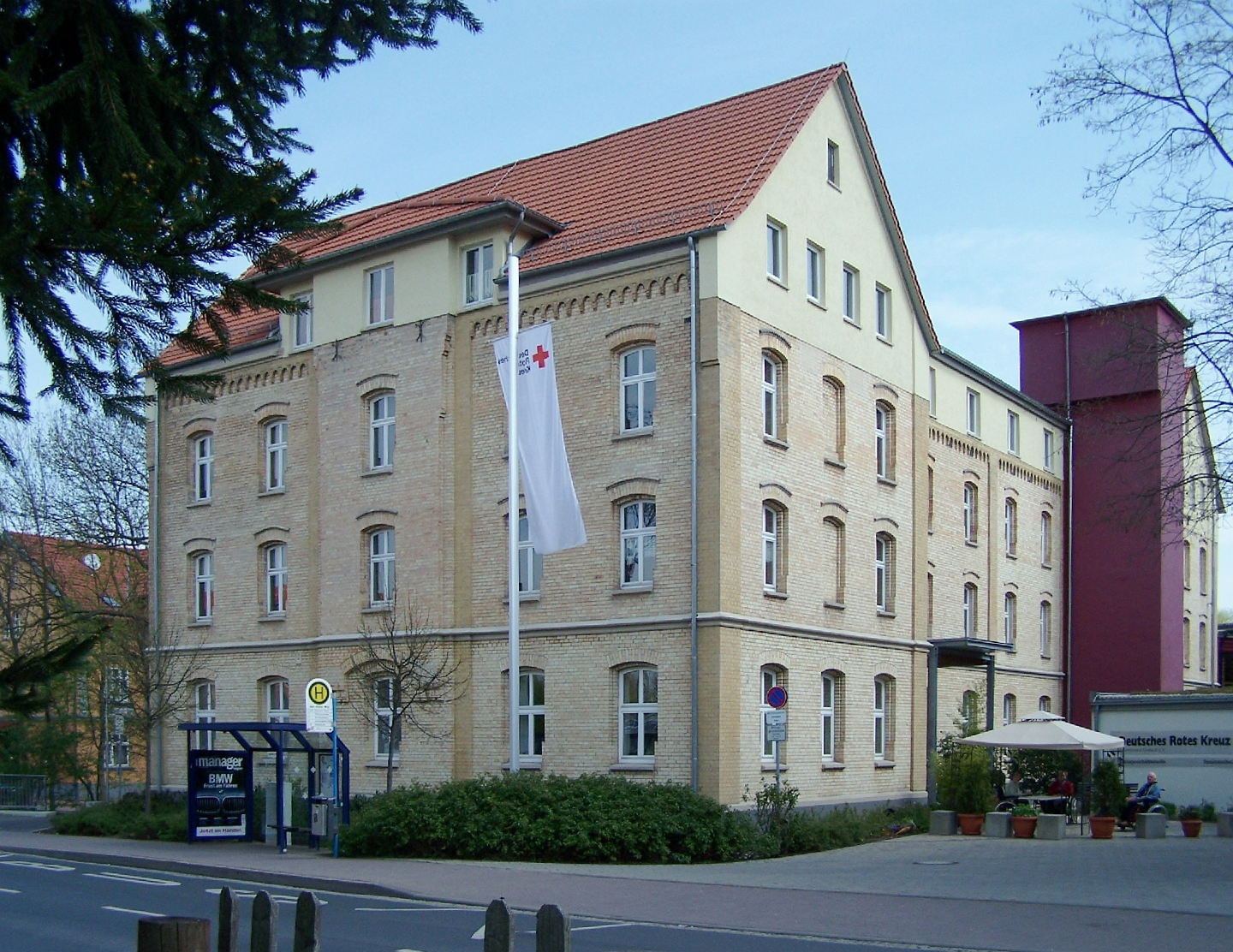 Justusstift